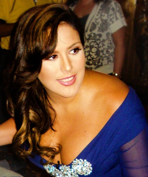 Angélica Vale at Ice Age 3 Los Angeles Premiere